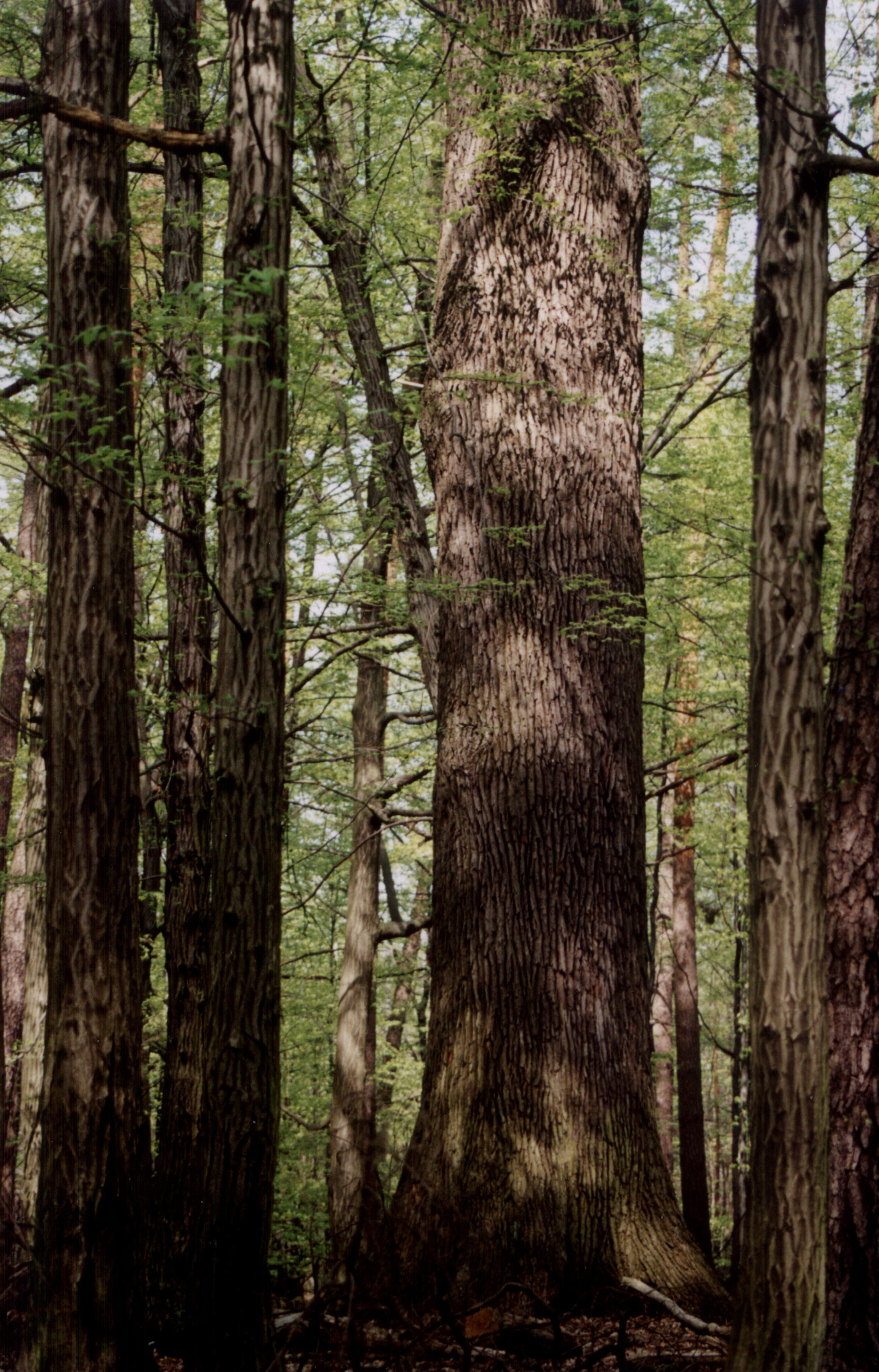 fragment rezerwatu przyrody Rajchowa Góra